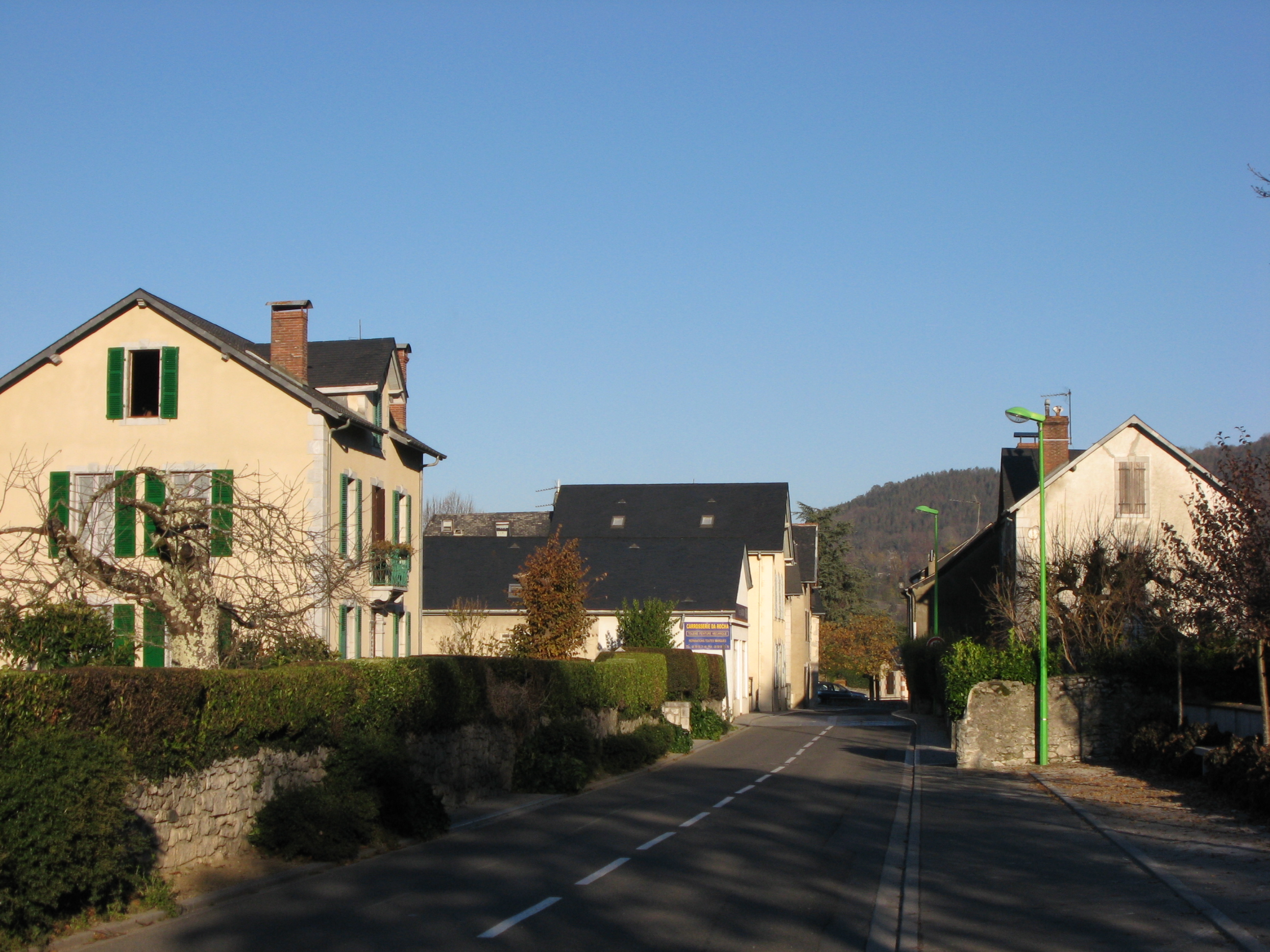 Rue d'Arudy (Pyrénées-Atlantiques) (Pyrénées).